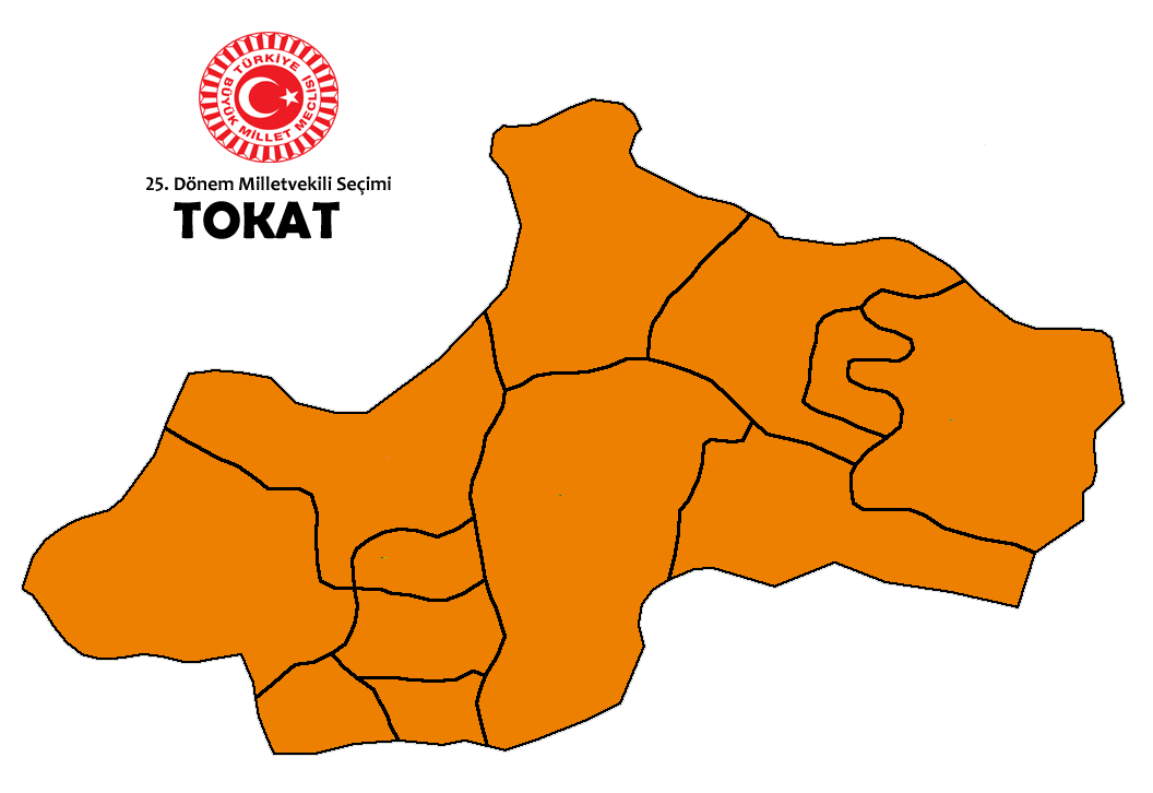 2015 genel seçim sonuçları